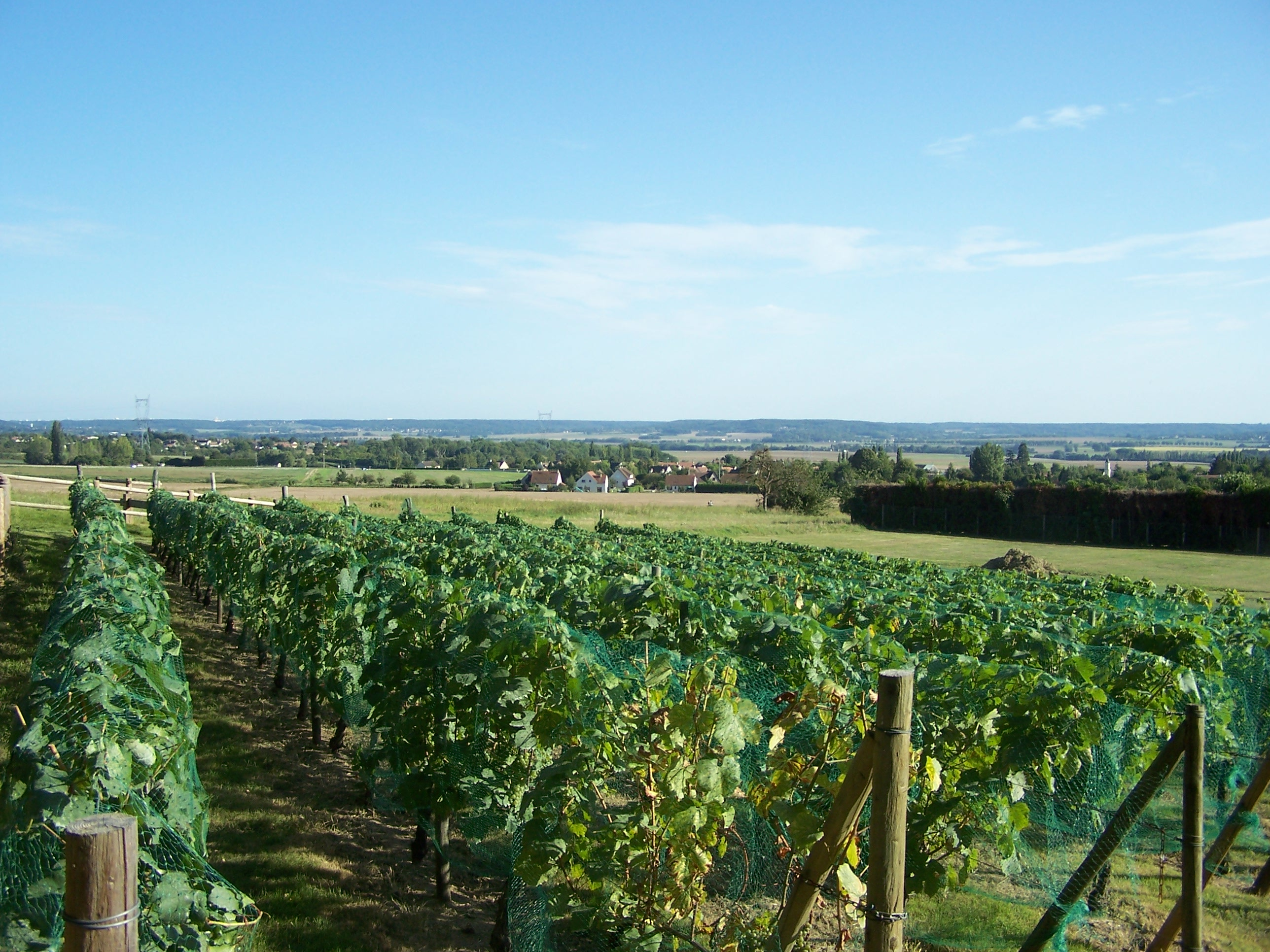 Vignoble d'Auteuil (Yvelines, France) et vue de la plaine de Montfort